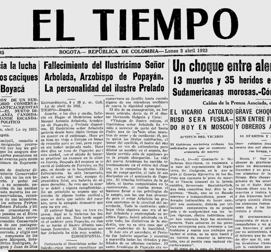 Portada del diario colombiano El Tiempo con noticia de fallecimiento Arzobispo Arboleda